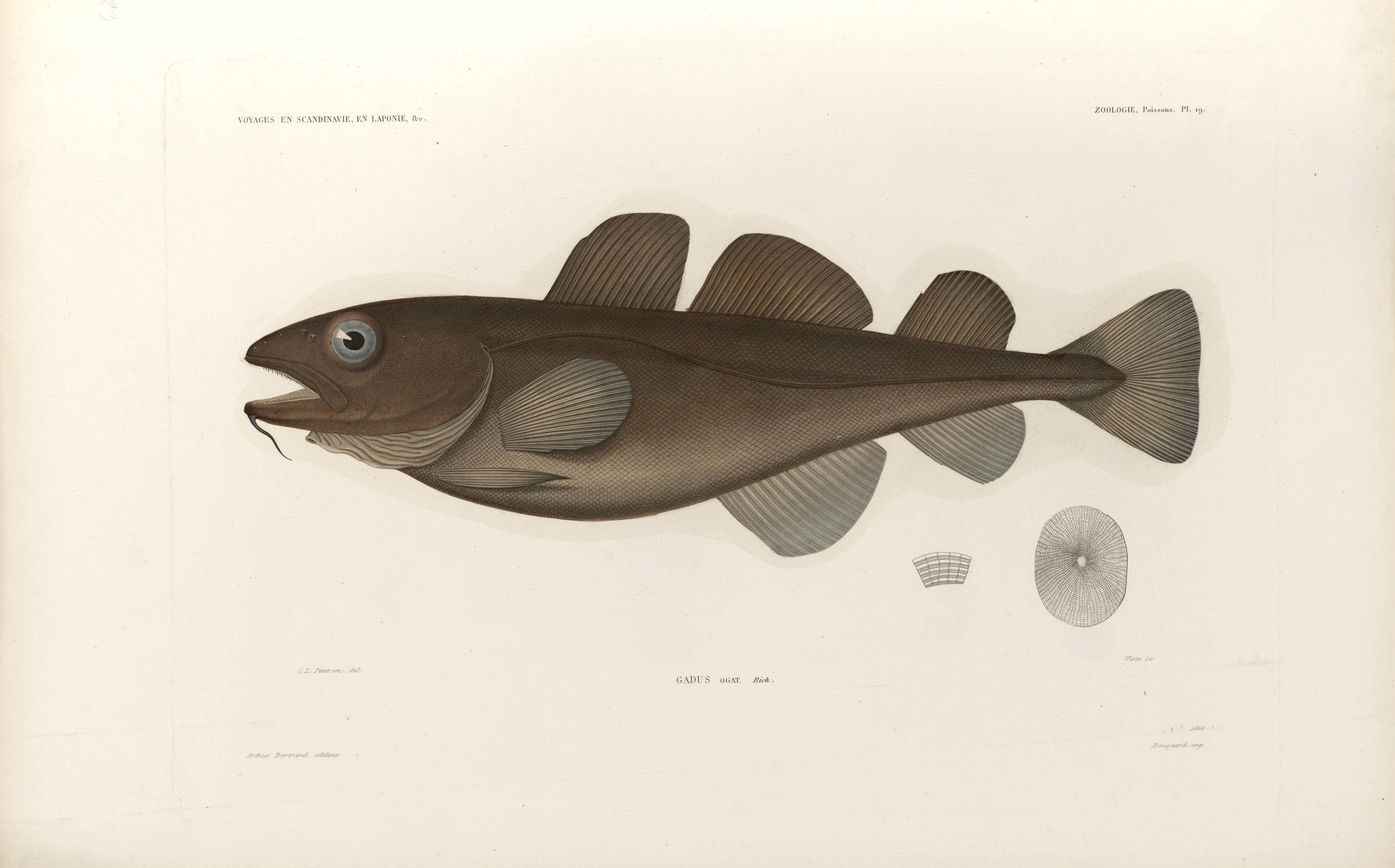 Illustrasjon hentet fra boken "Voyages de la Commission scientifique du Nord, en Scandinavie, en Laponie, au Spitzberg et aux Feröe" av ukjent forfatter og utgitt av Arthus BertrandParis : Arthus Bertrand, 1842-1855 (Paris, 185?)